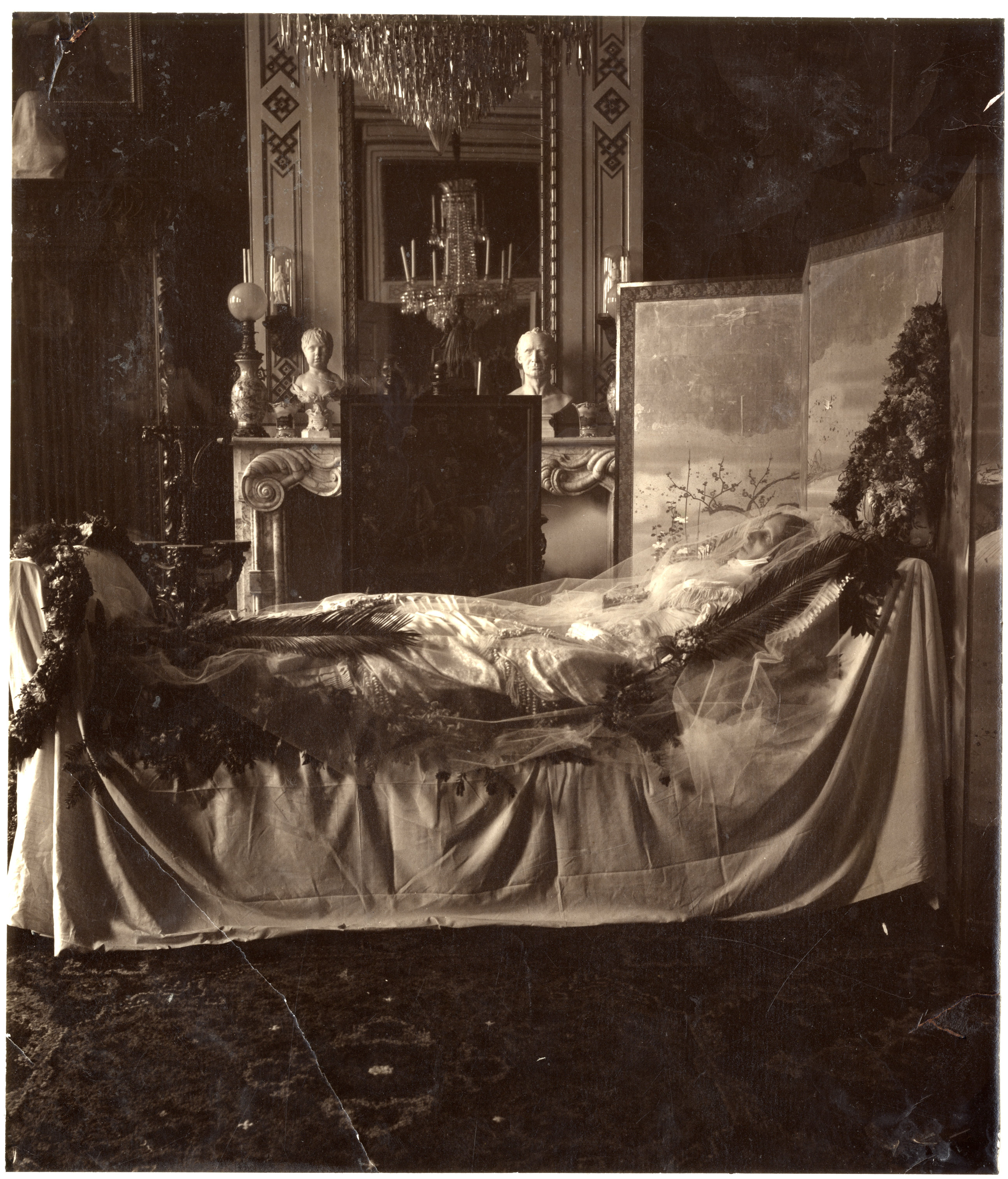 Portret van koningin Sophie der Nederlanden op haar doodsbed (1877).